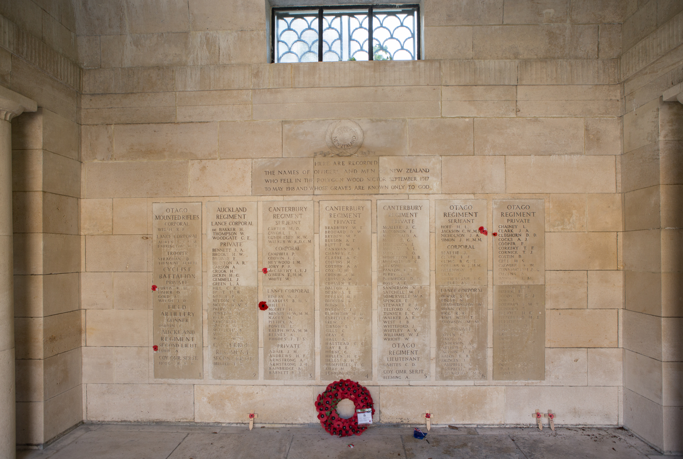 Buttes New British Cemetery (N.Z.) Memorial, Polygon Wood